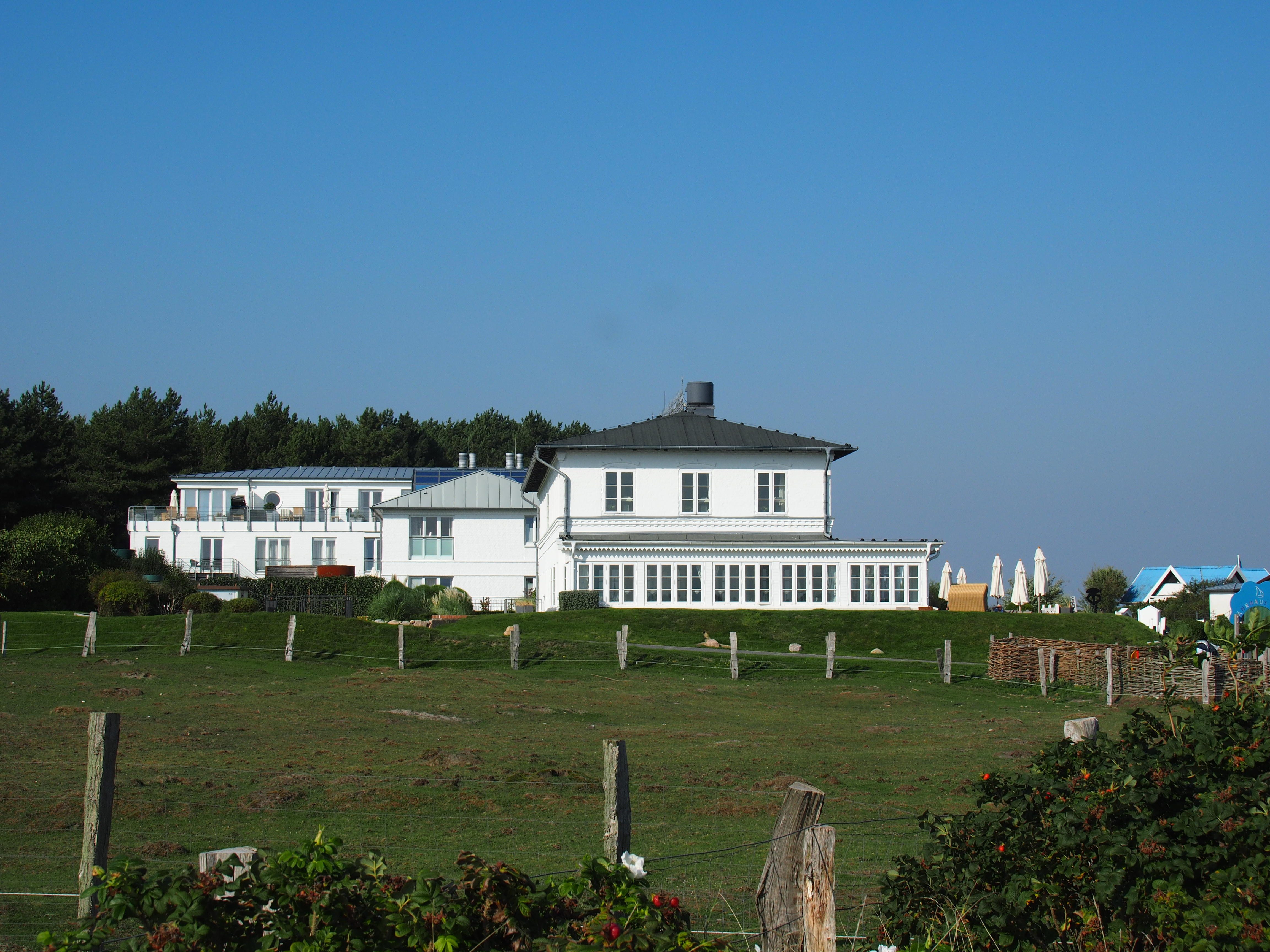 Hotel Restaurant „Fährhaus Munkmarsch“ Munkmarsch (Sylt)